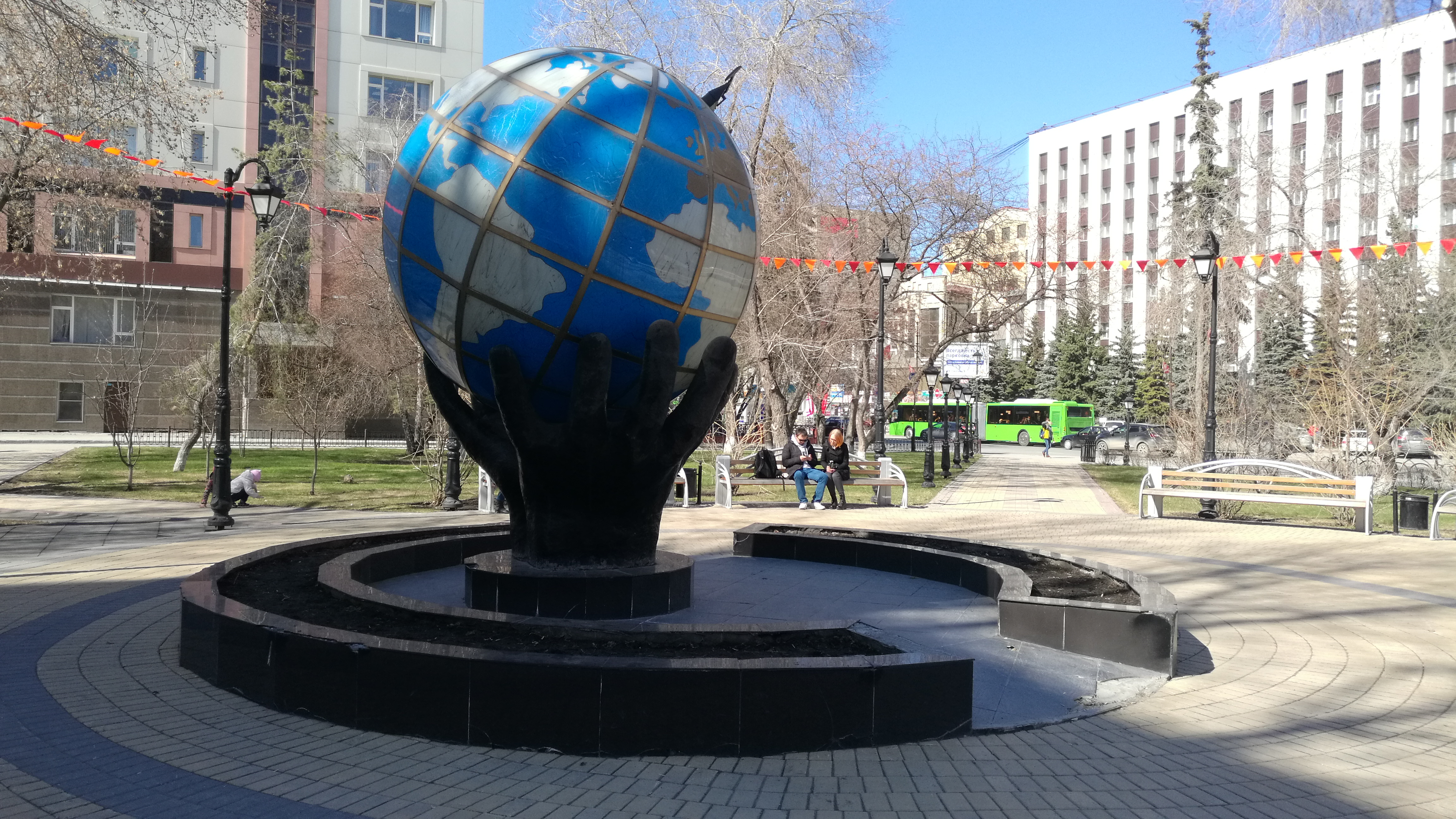 Skvaro de Naftistoj. Tjumeno, Rusio.